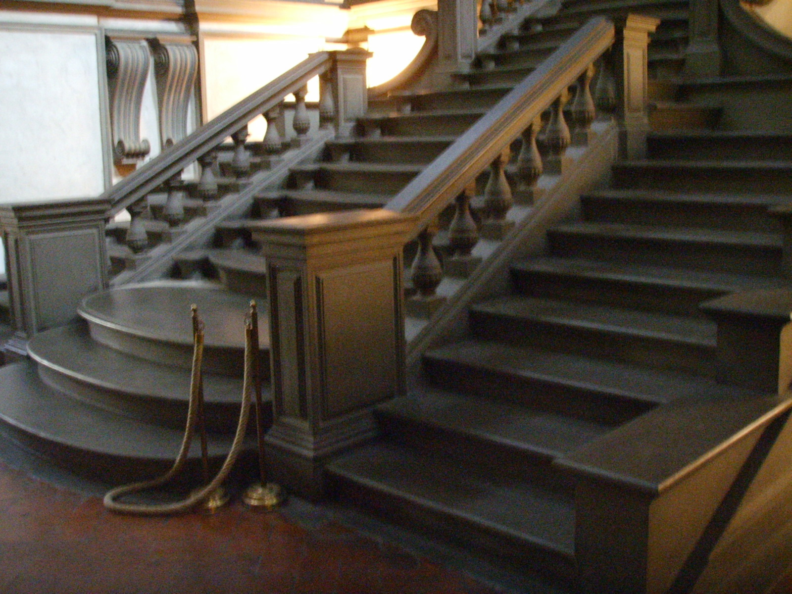 Biblioteca medicea laurenziana scalone di michelangelo